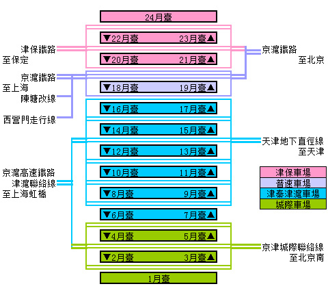 根據京滬高速鐵路天津西站站場示意圖繪製